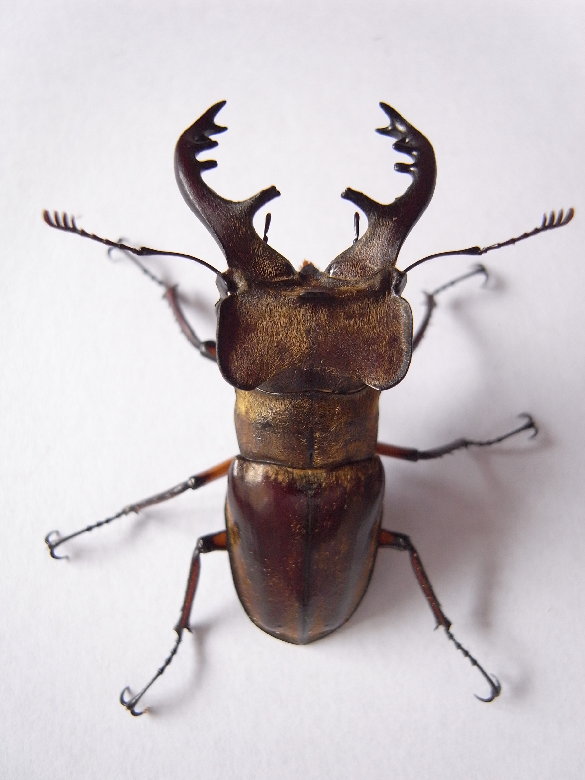 採集場所：埼玉県 70mm